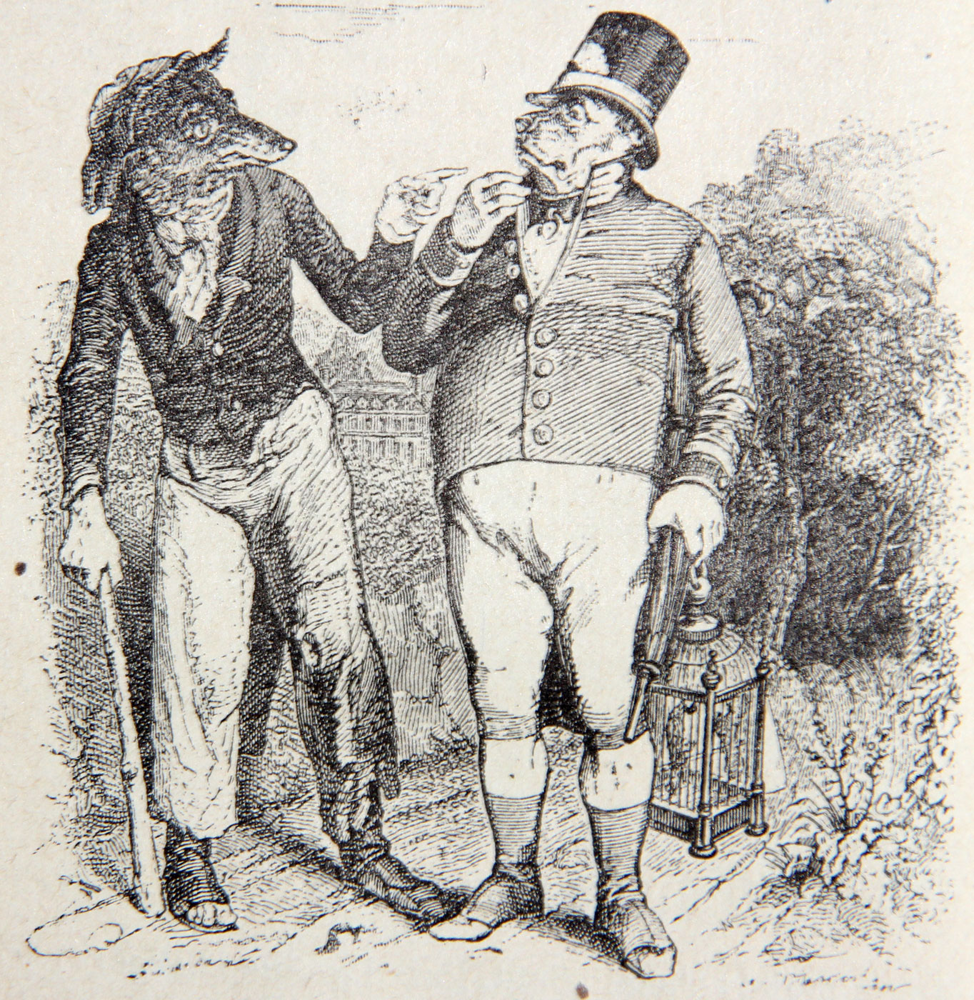 Illustration de Grandville pour la fable de La Fontaine, Le loup et le chien (I, 5)